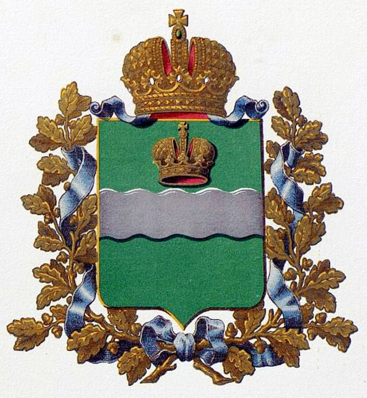 Official Russian Empire coat of arms Kaluga Governorate. Герб Российской Империи Калужской губернии в Гербовнике МВД. Утверждён Императором Всероссийским Александром Вторым.